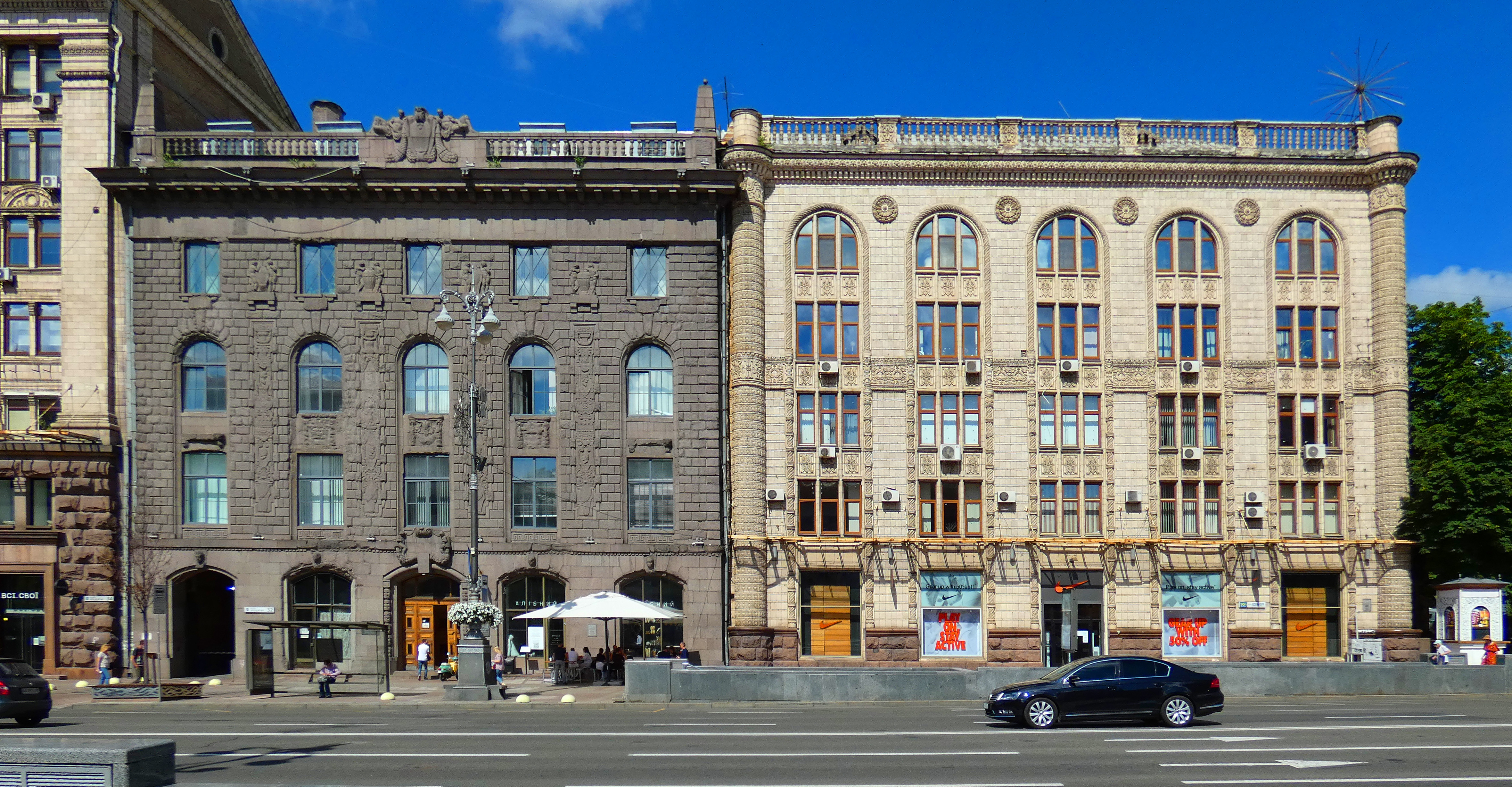 Будинок на Хрещатику (зліва), Київ, вул. Хрещатик, 32